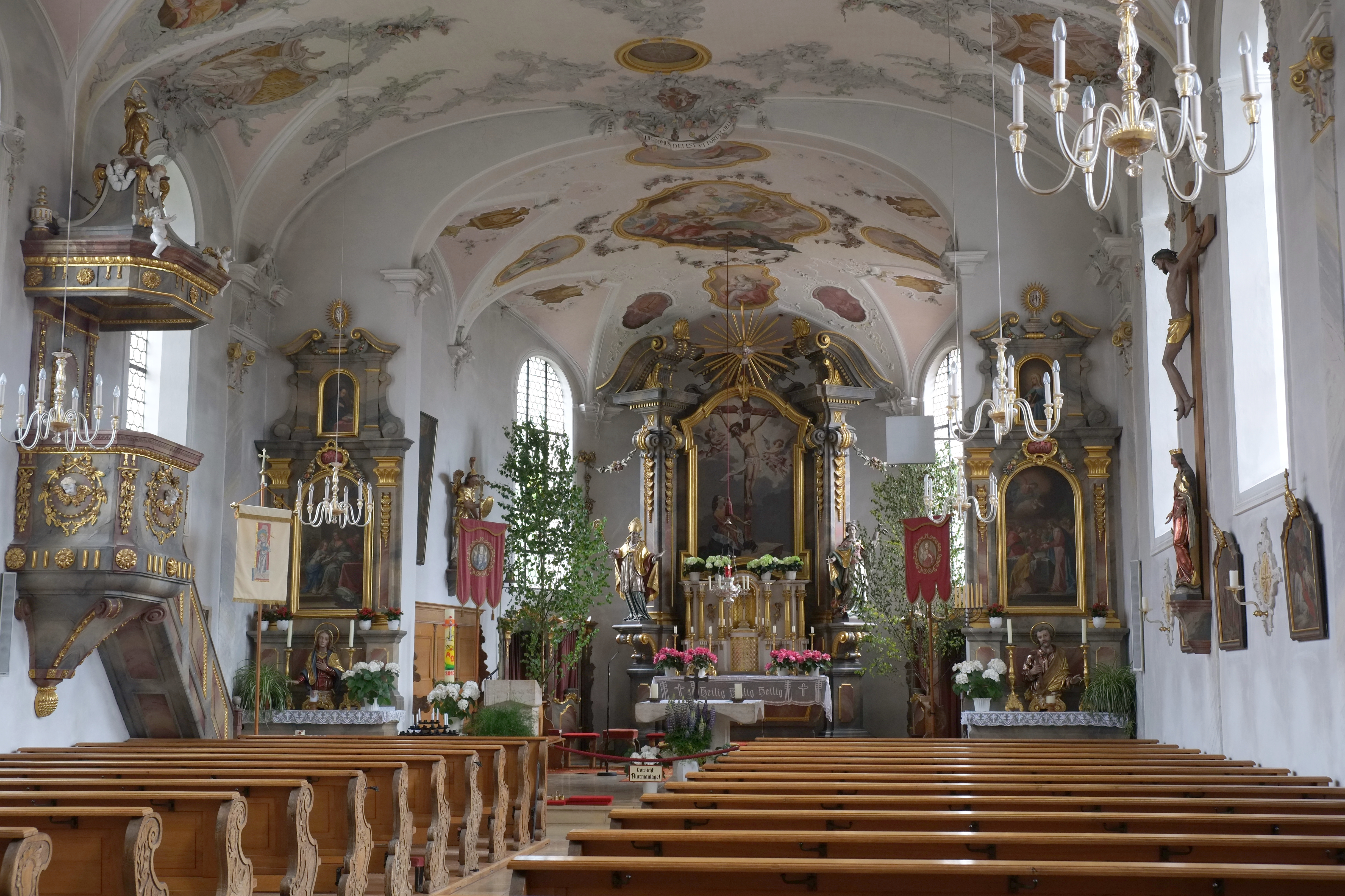 katholische Pfarrkirche St. Michael in Fischach im Landkreis Augsburg (Bayern)